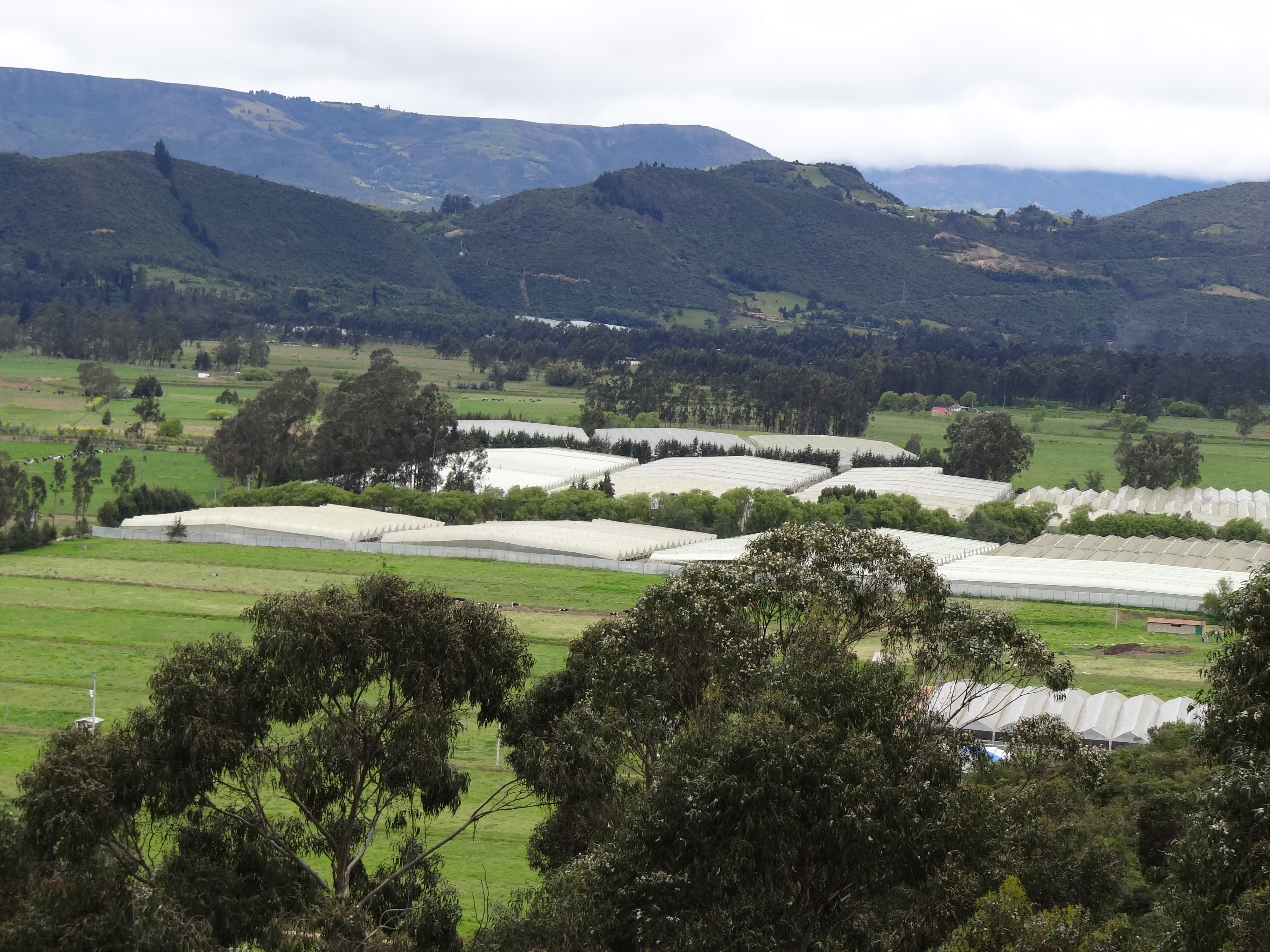 Invernaderos de flores en inmediaciones a Nemocón, Cundinamarca, Colombia